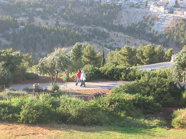 Ha Tayelet - looking over Jerusalem and Abu Tor